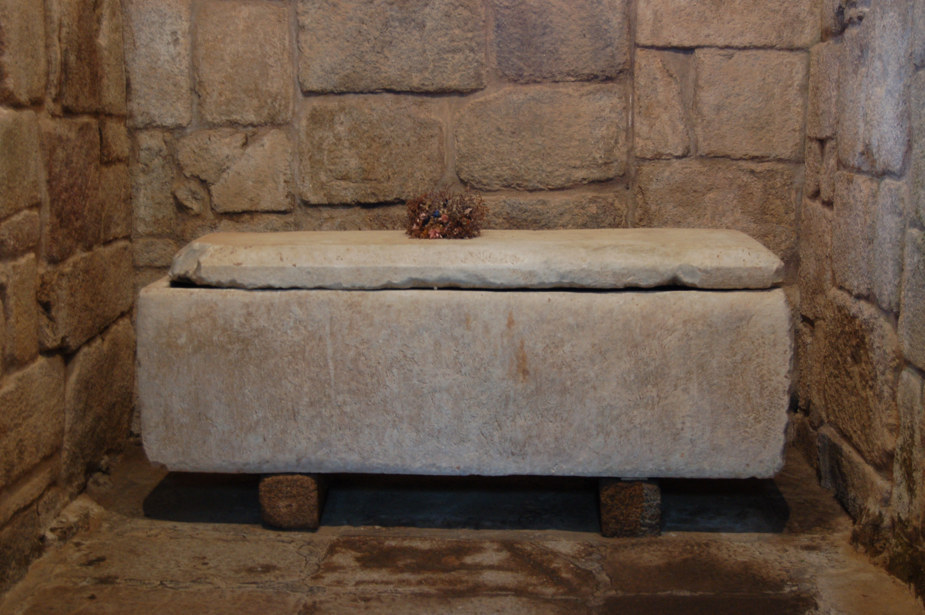 Sartego de san Trocado na igrexa de Santa Comba de Bande